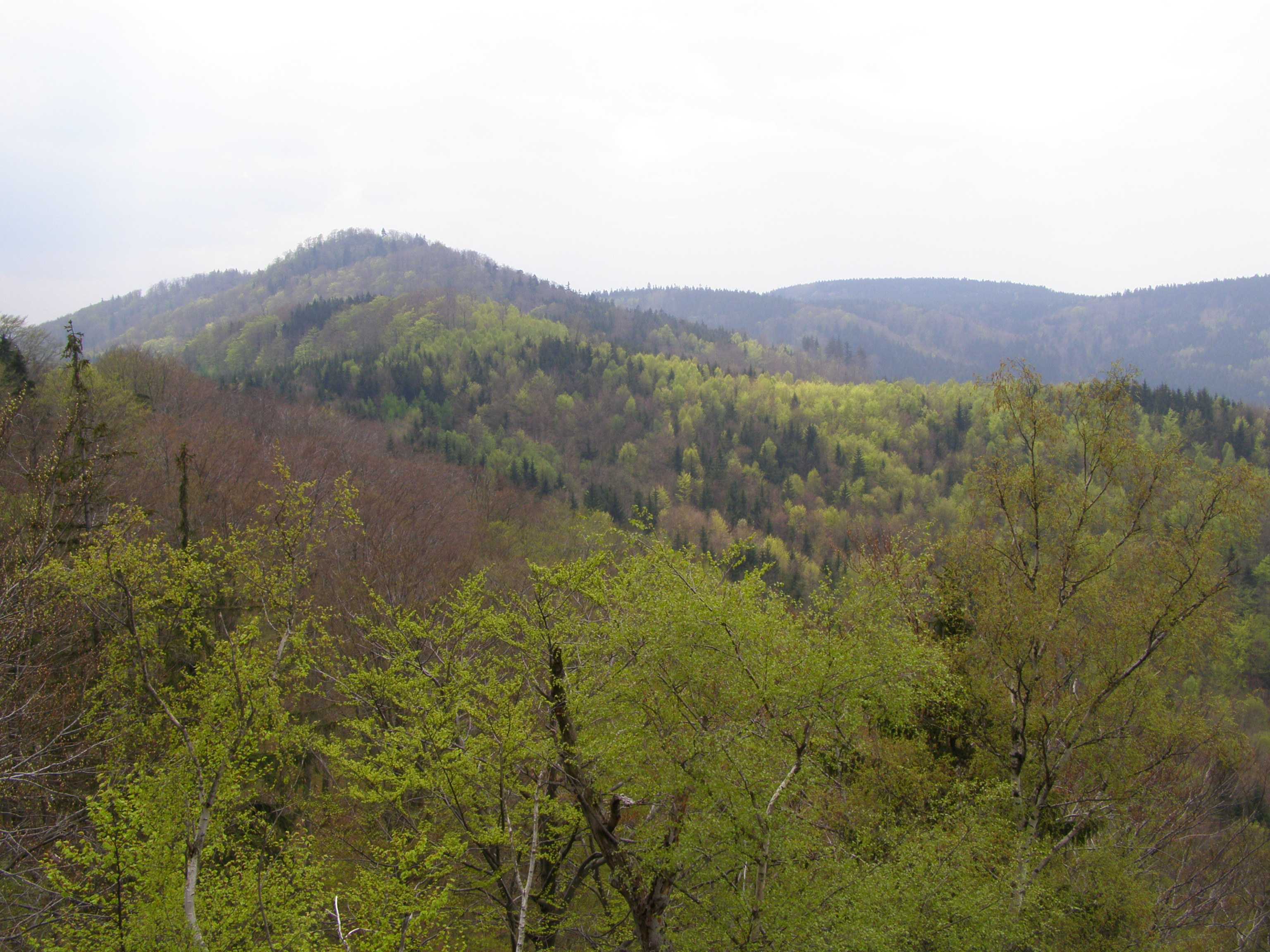 Oldřichovská vrchovina, NPR Jizerskohorské bučiny, vrchol Špičák (724 m) od severovýchodu, pohled ze Skalního hradu